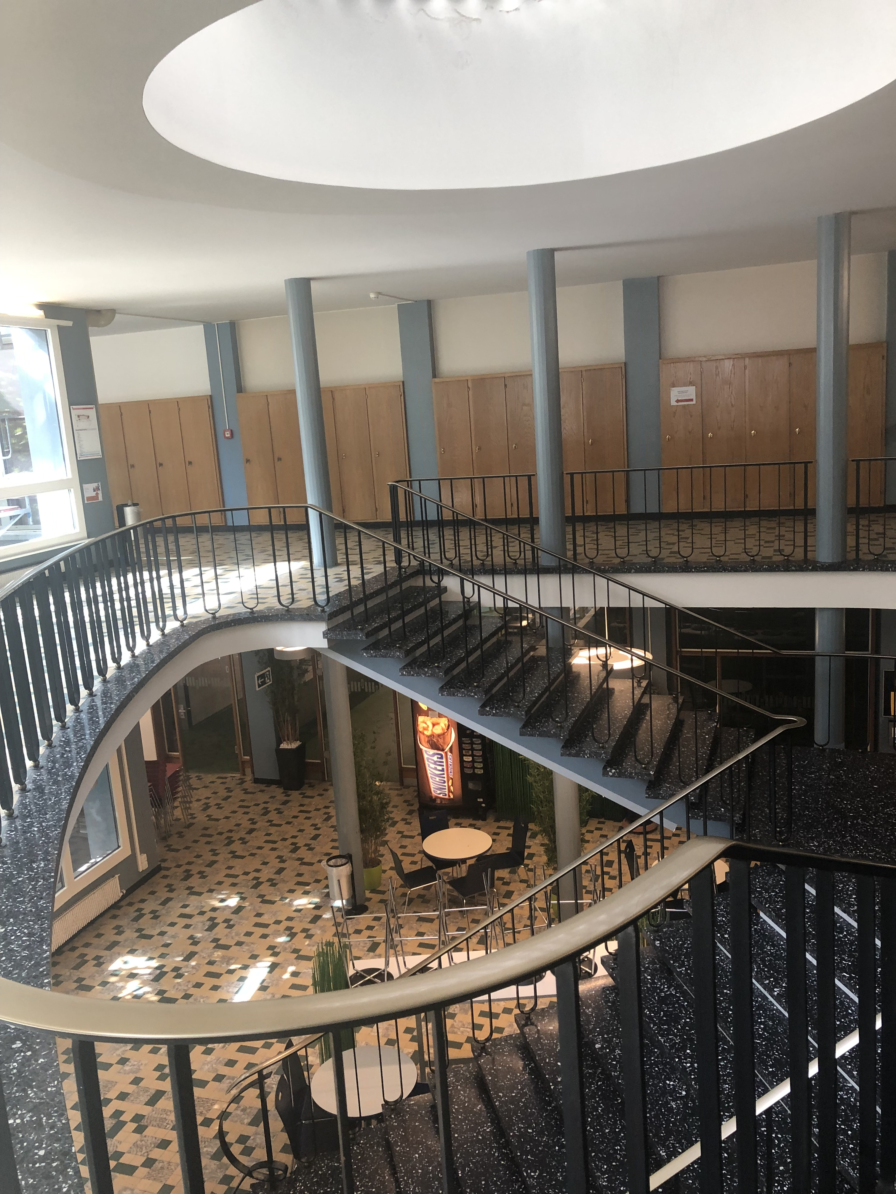 Universität Freiburg (Schweiz): Treppenhaus Regina Mundi